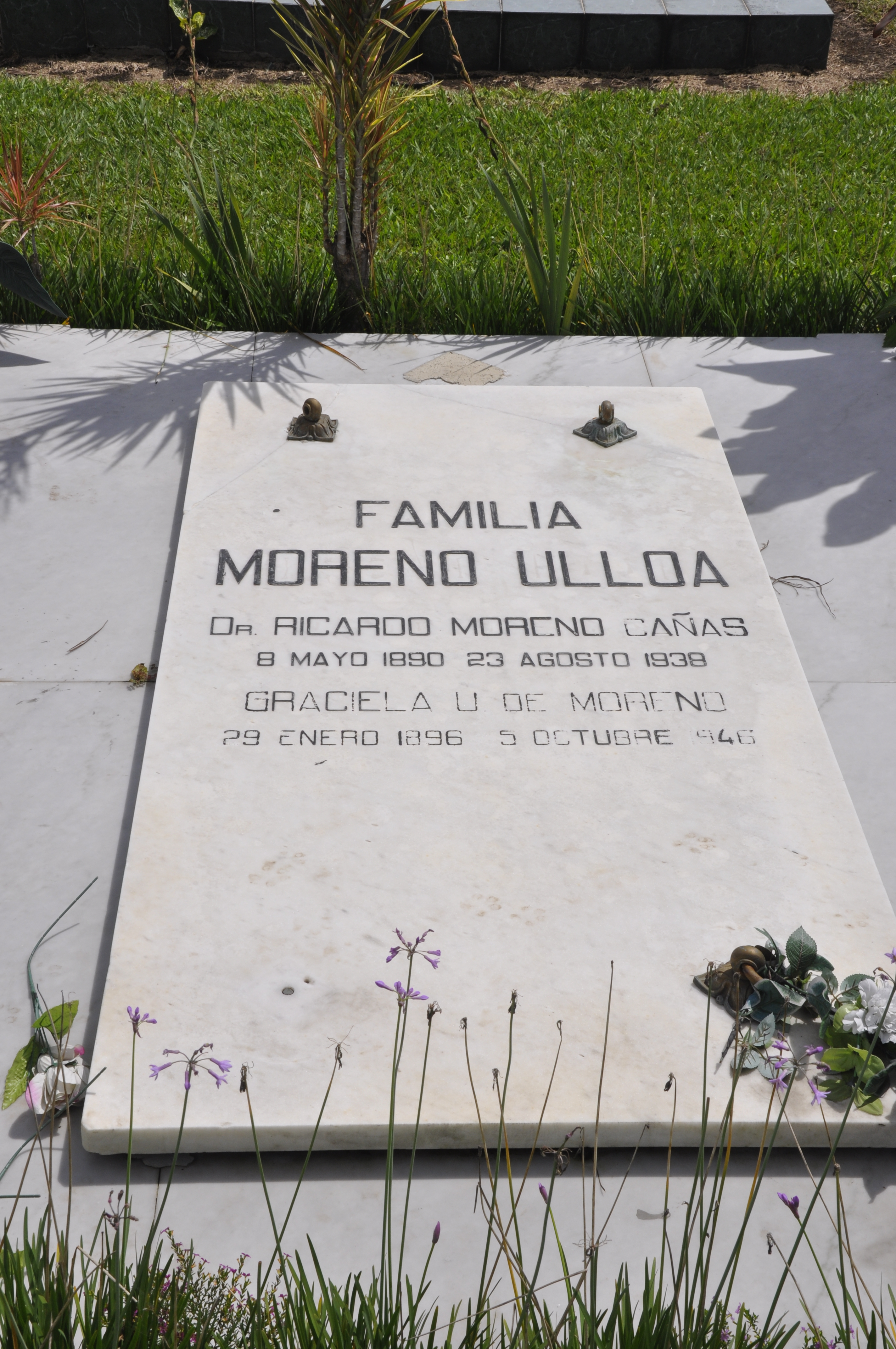 Tumba del dr. Ricardo Moreno Cañas, en el Cementerio General, San José, Costa Rica.